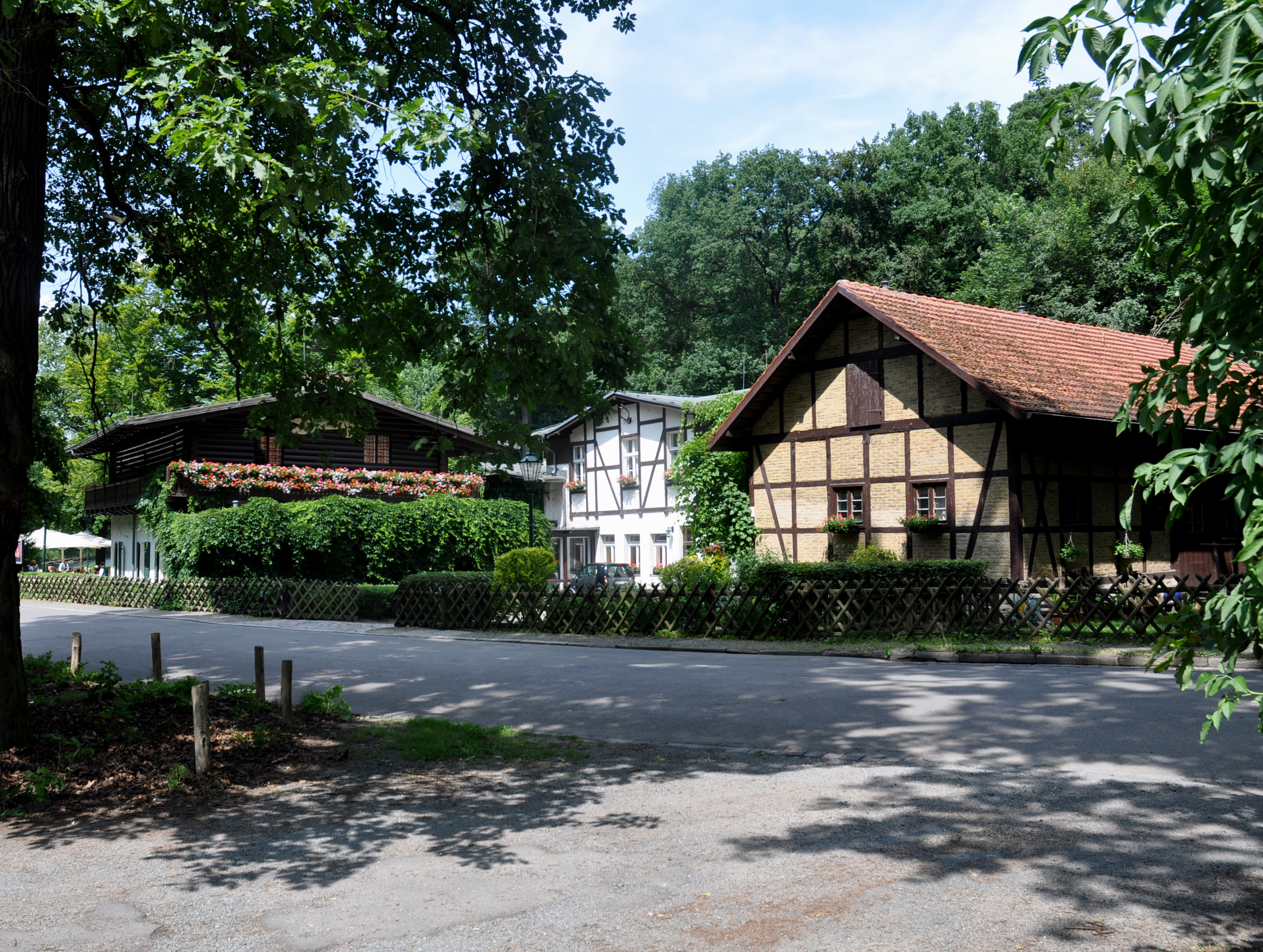 Rückansicht der ehem. Unterförsterei und Nebengebäude